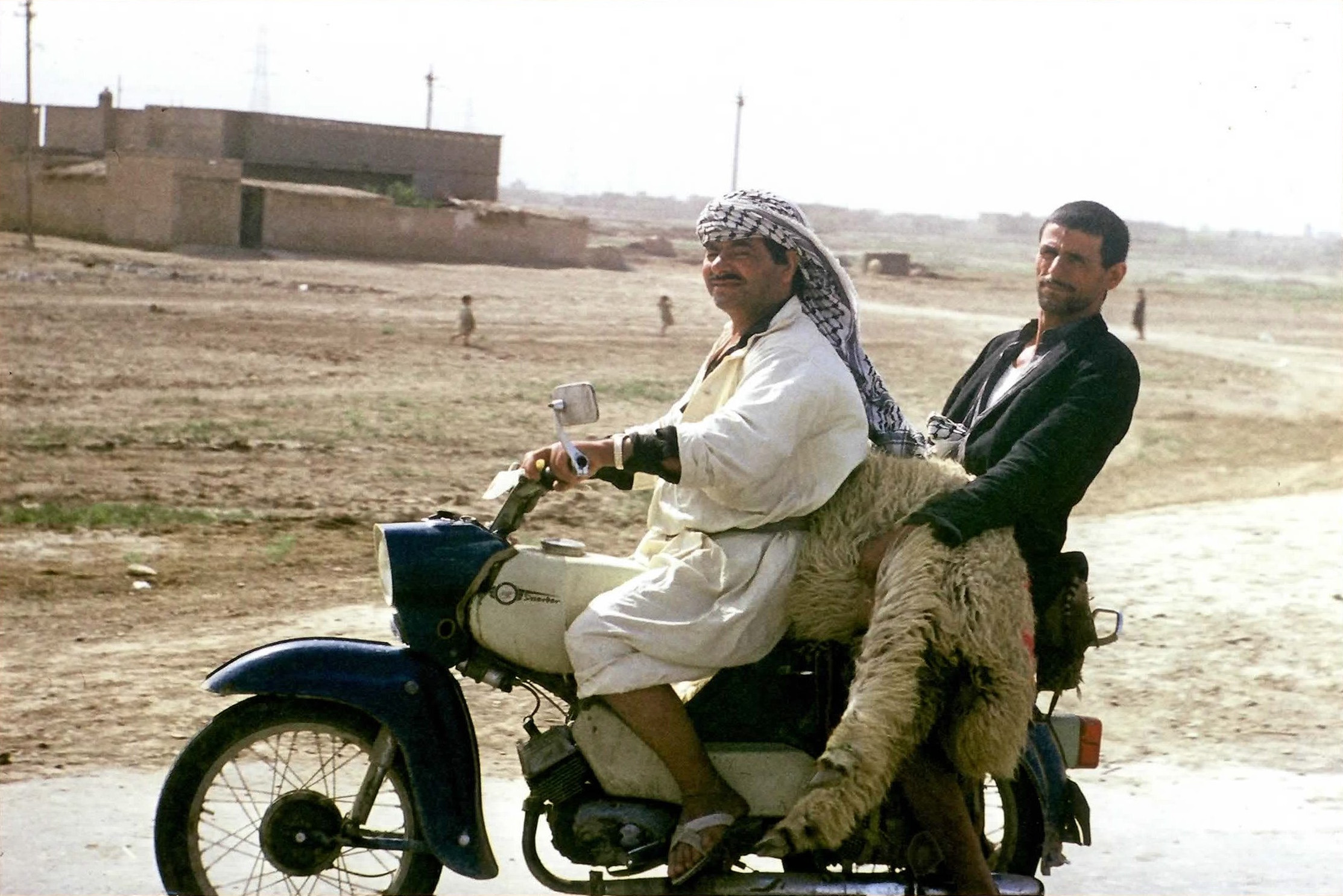 Dieses Foto machte mein Opa, als er 1970-73 als DDR-Bürger im Süd-Irak beruflich tätig war. Es zeigt, dass der Simson Sperber aus Suhl offenbar auch dort hin exportiert wurde und dort den örtlichen Transportbedürfnissen Rechnung trug.